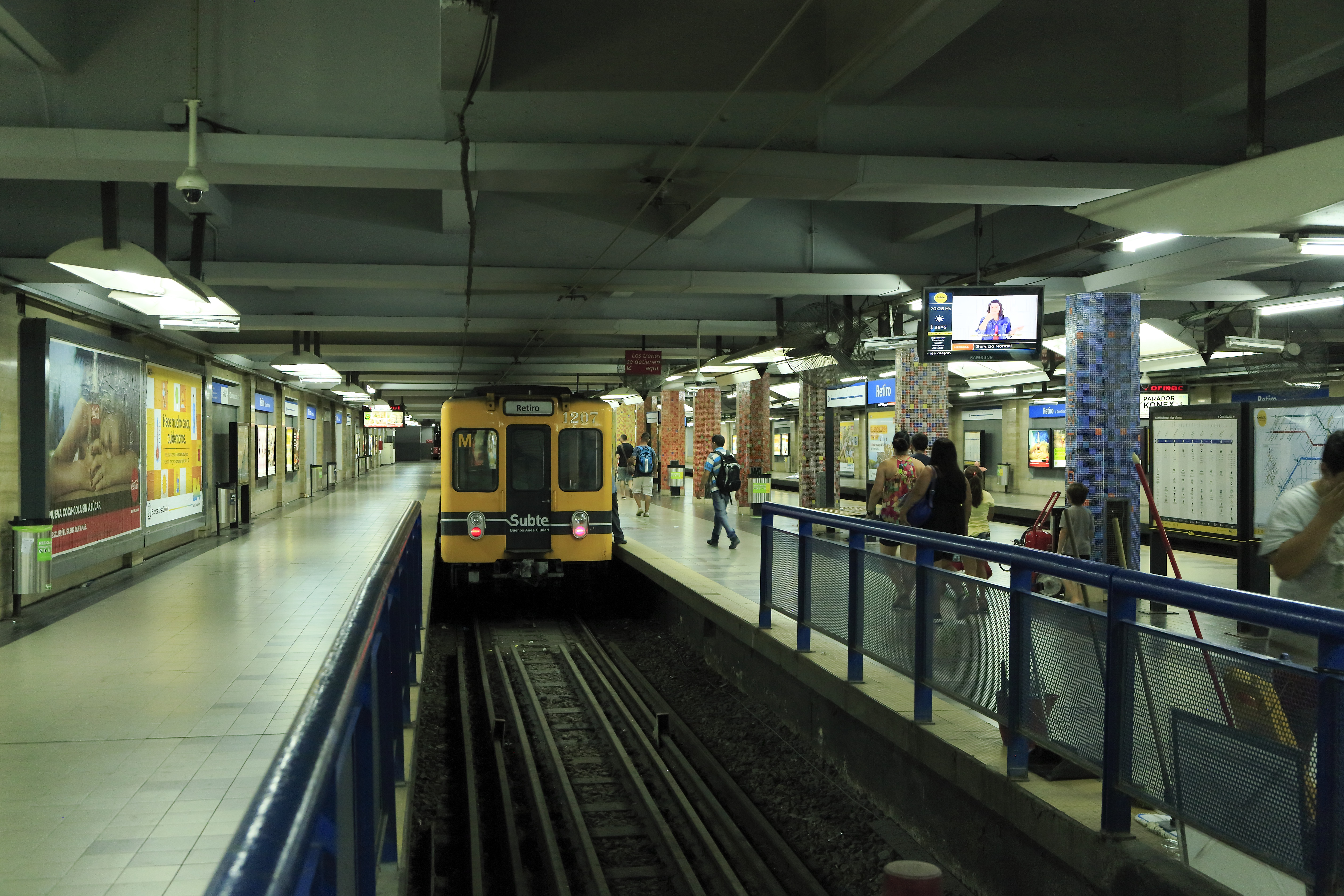 Der nördliche Endpunkt der wichtigen Linie C, die die Fernbahnhöfe im Norden und Süden verbindet. Eben wegen der starken Belastung sind Bahnsteige hier in spanischer Anordnung vorhanden. Die Außenbahnsteige sind die Ankunftsbahnsteige, der Inselbahnsteig mit vorgelagerten Bahnsteigsperren der Abfahrtsbahnsteig. Kehranlagen gibt es auf der Linie C an beiden Enden nicht, die Züge kehren zwangsweise kurz.Der Zug stammt von der U-Bahn Nagoya, mit diesen kam die U-Bahn Buenos Aires zu Janneykupplungen mit Starrmachungsorganen und »Nichtraucher«-Schildern auf japanisch und englisch.